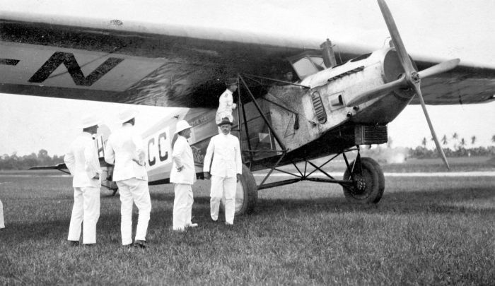 Repronegatief. De Fokker VII op het vliegveld te Medan, waar het op 24 november 1924 als eerste vliegtuig op de vlucht tussen Holland en Indië landde